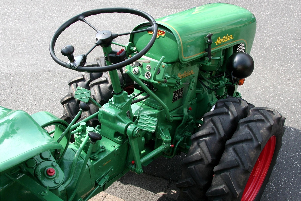 Holder A 12 (Knicklenker) in Mendig – Detail: Lenkung; Zweitakt-Dieselmotor (Fichtel & Sachs), 599 cm³, 8,8 kW (12 PS)